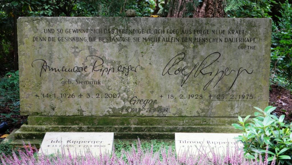 Grab des Schauspielers, Kabarettisten und Rundfunkmoderators Rolf Ripperger (1928-1975) auf dem Südwestkirchhof in Stahnsdorf